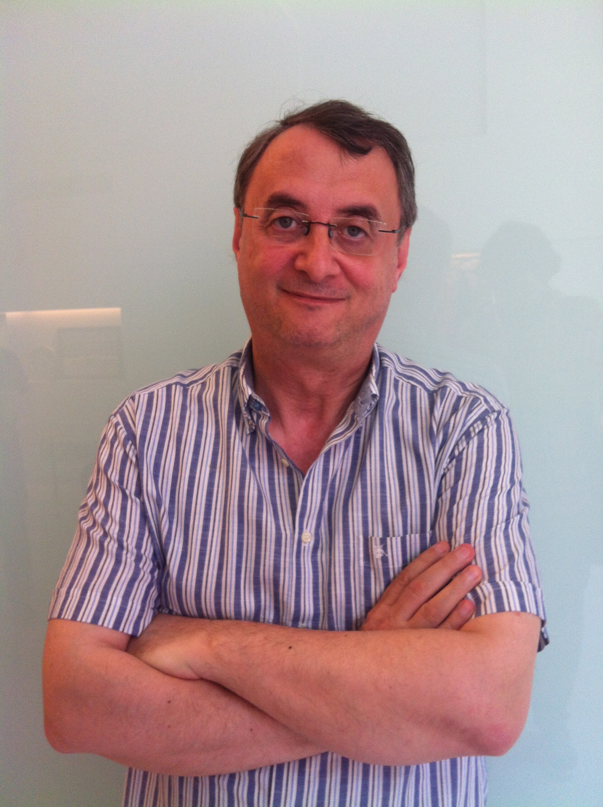 Vicent Partal a Vilaweb